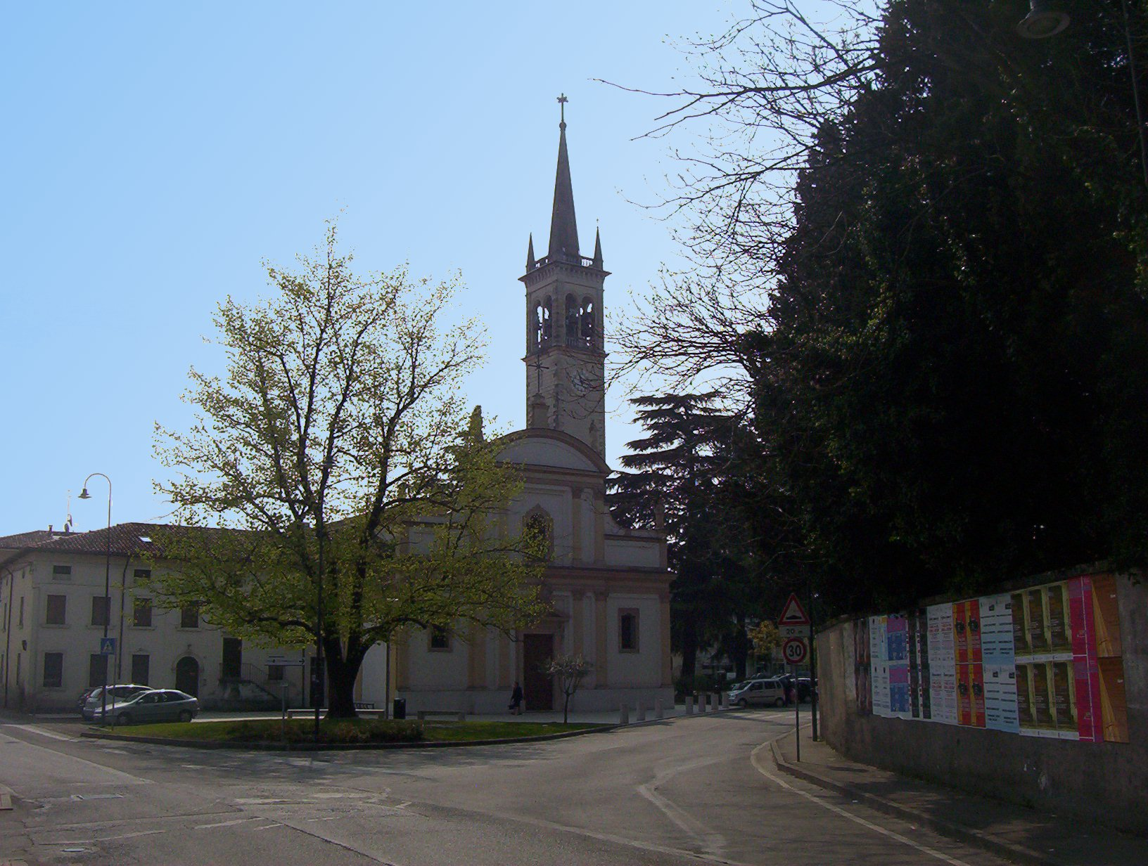 Chiesa del Chievo (frazione di Verona)